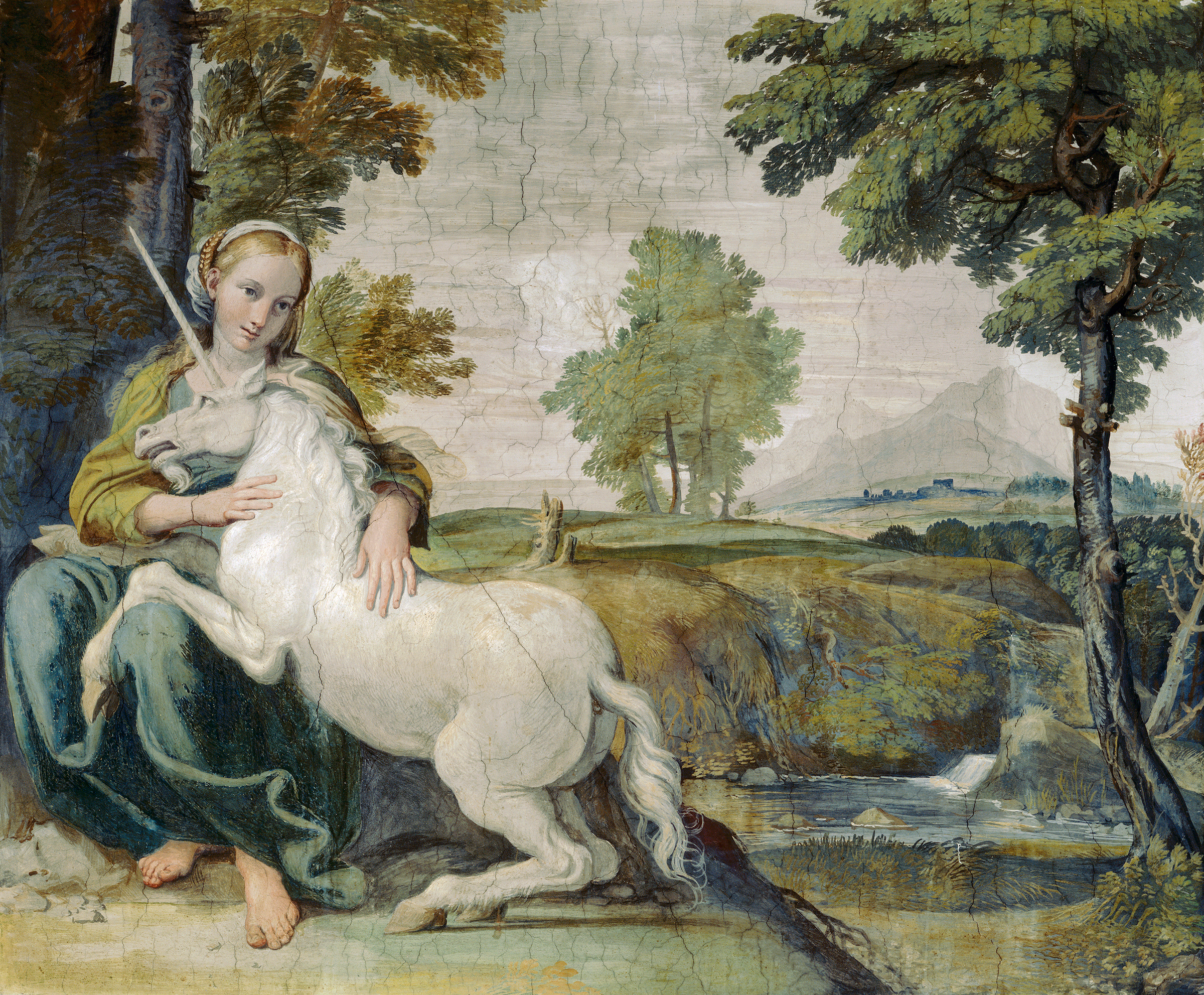 (depicting Giulia Farnese)